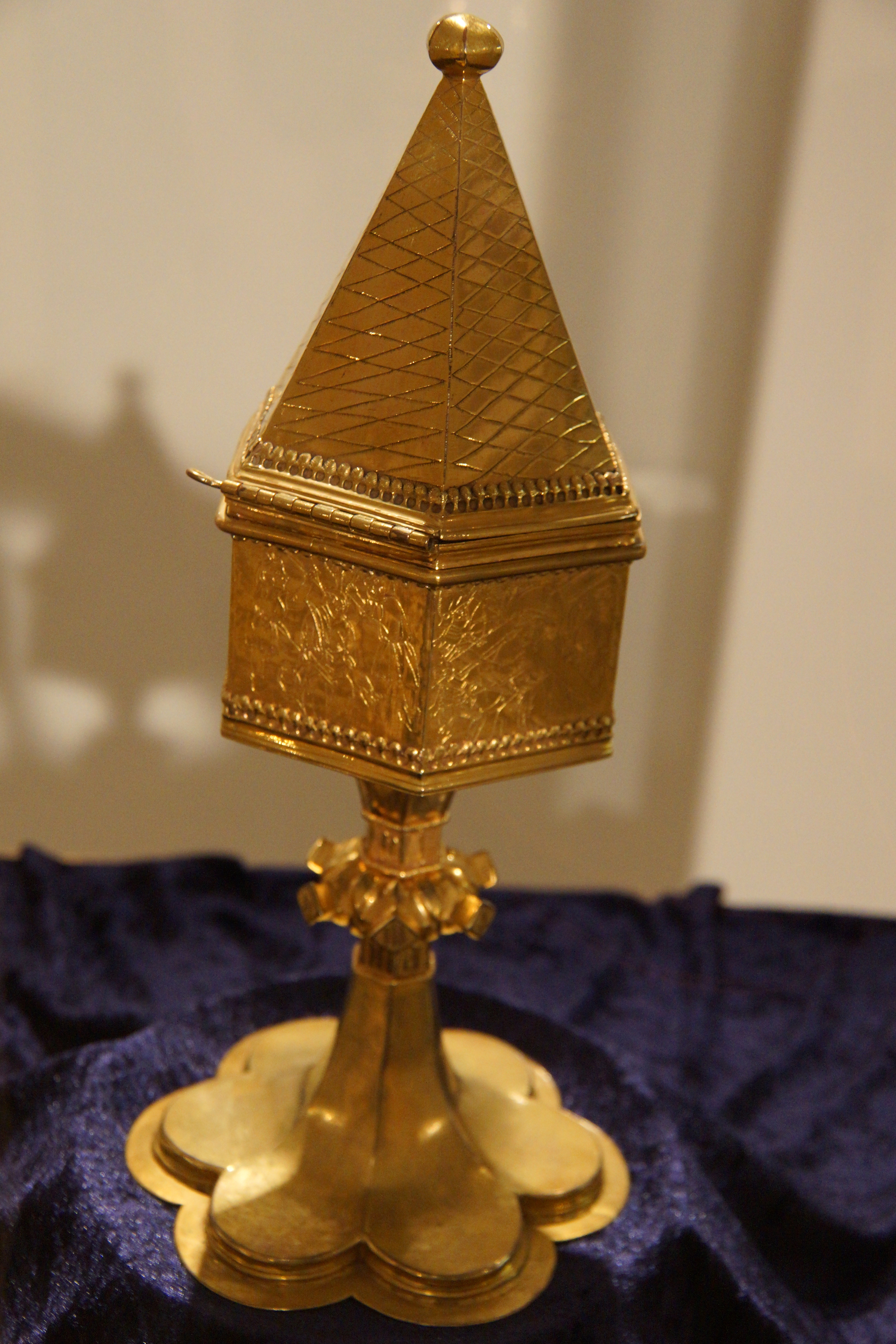 Sonderausstellung des Stadtmuseums Neumarkt: Des Himmels Glanz auf Erden - Kirchenschätze aus Neumarkt